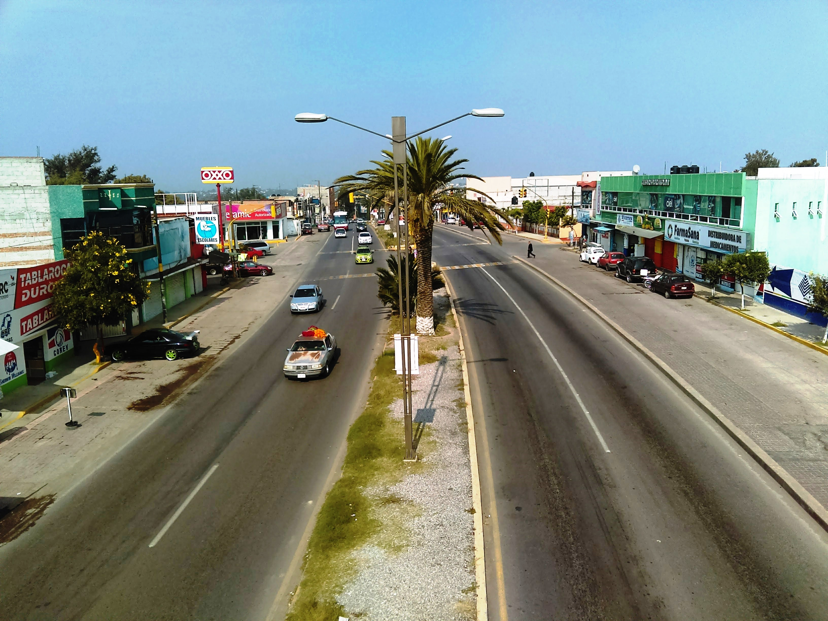 Carreterra en Actopan, Hidalgo (México).